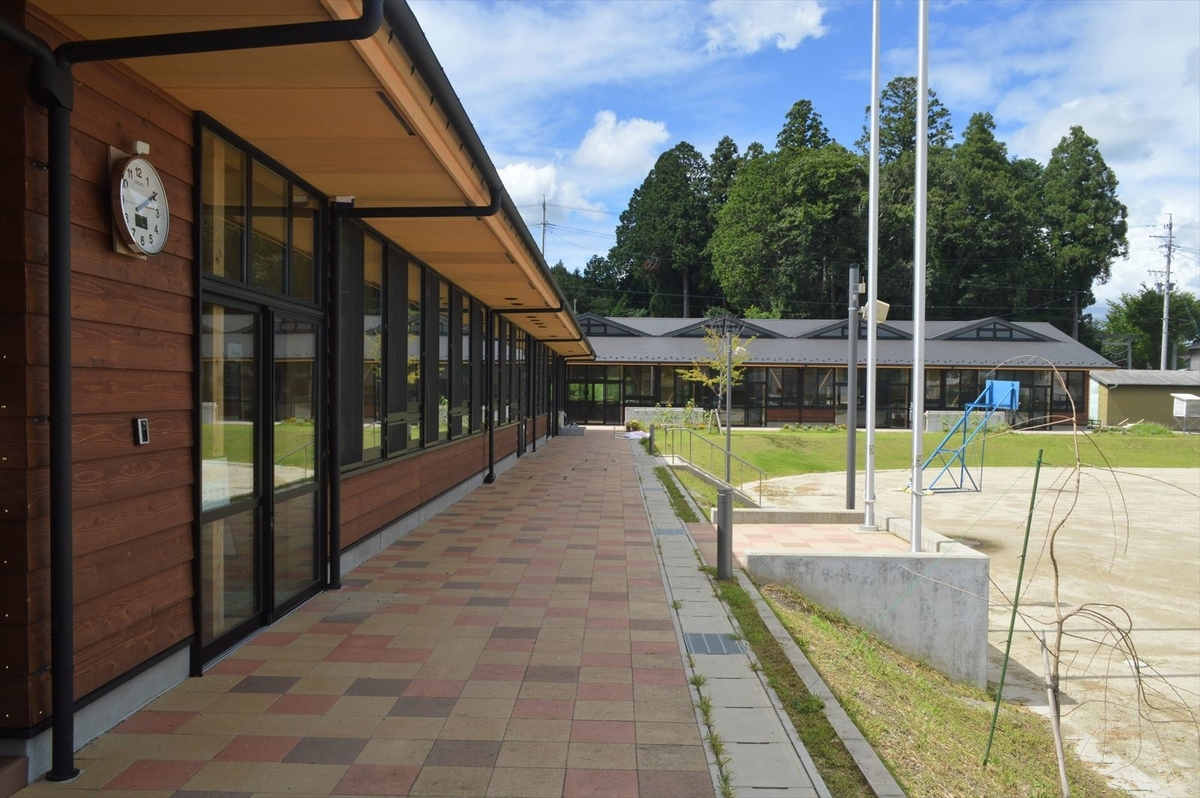 愛知県新城市にある新城市立作手小学校。